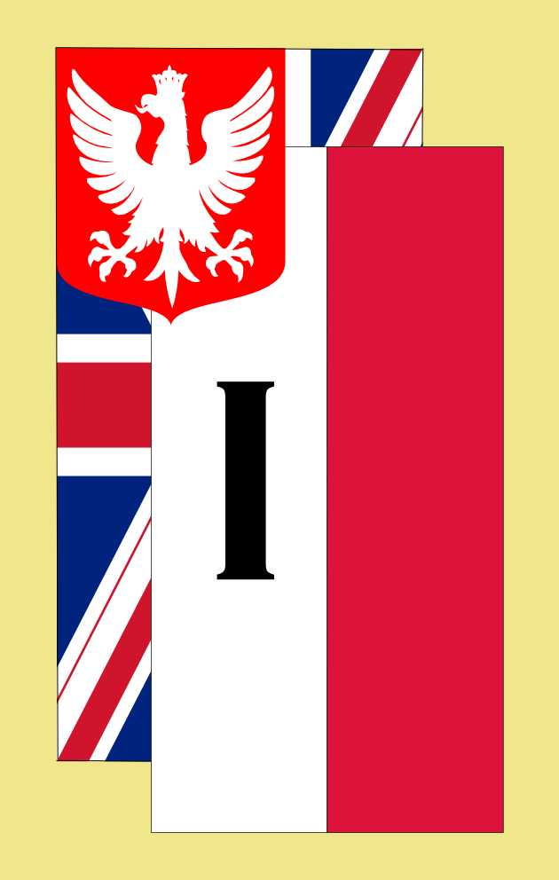 Godło - znak 1 Korpusu Polskiego Polskich Sił Zbrojnych na Zachodzie (na podkładce koloru khaki)